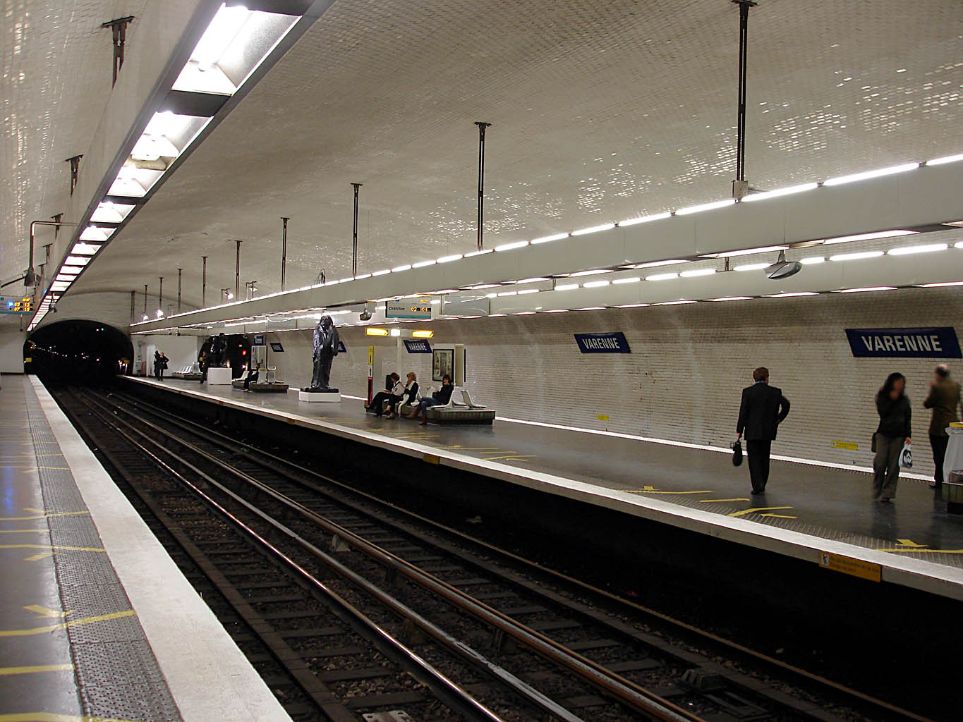 Station Varenne de la ligne 13 du métro de Paris, France.